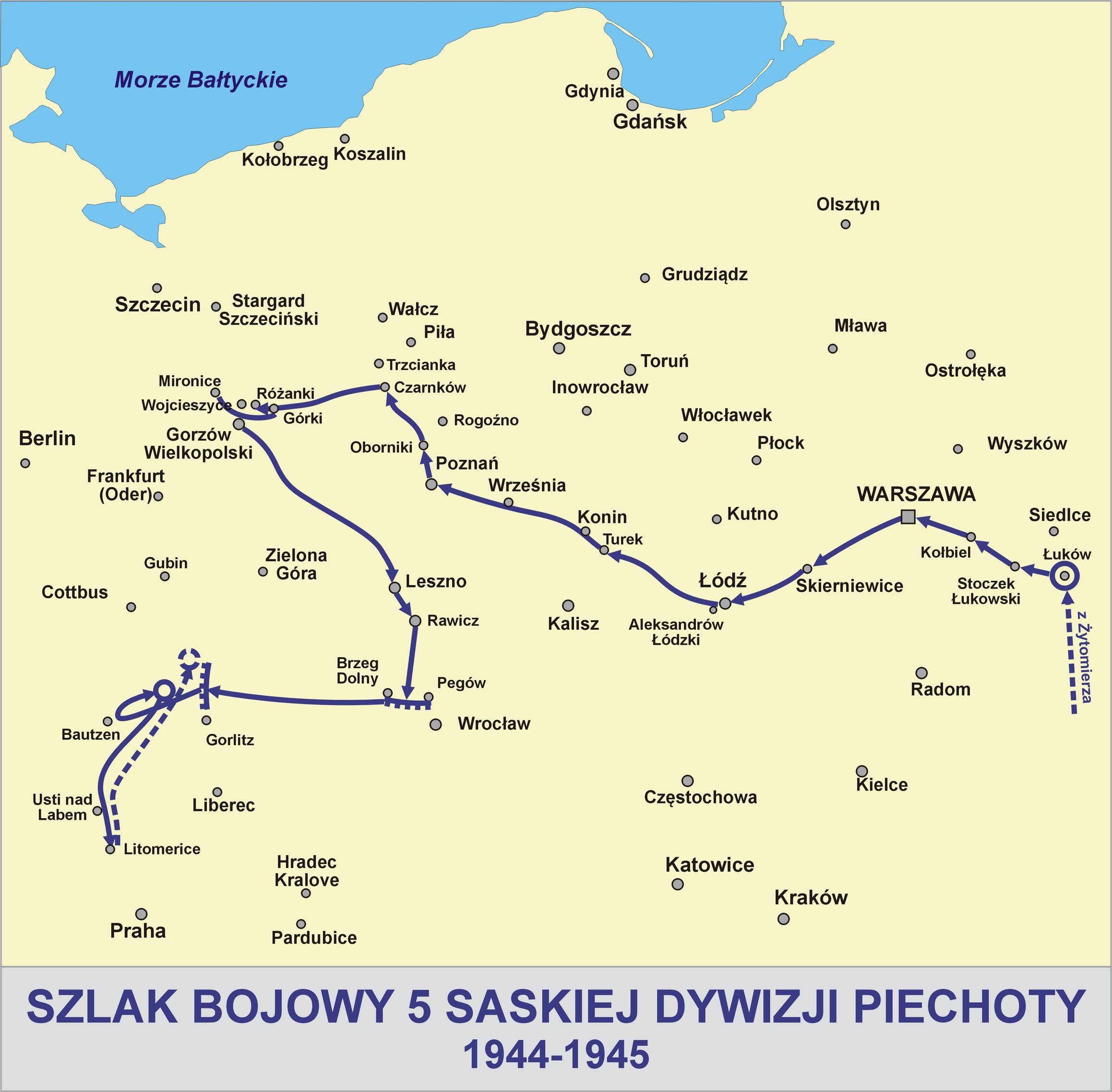 Szlak bojowy 5 Saskiej Dywizji Piechoty 1944-1945